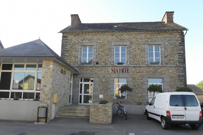 Mairie de Saint-Christophe-des-Bois (35).